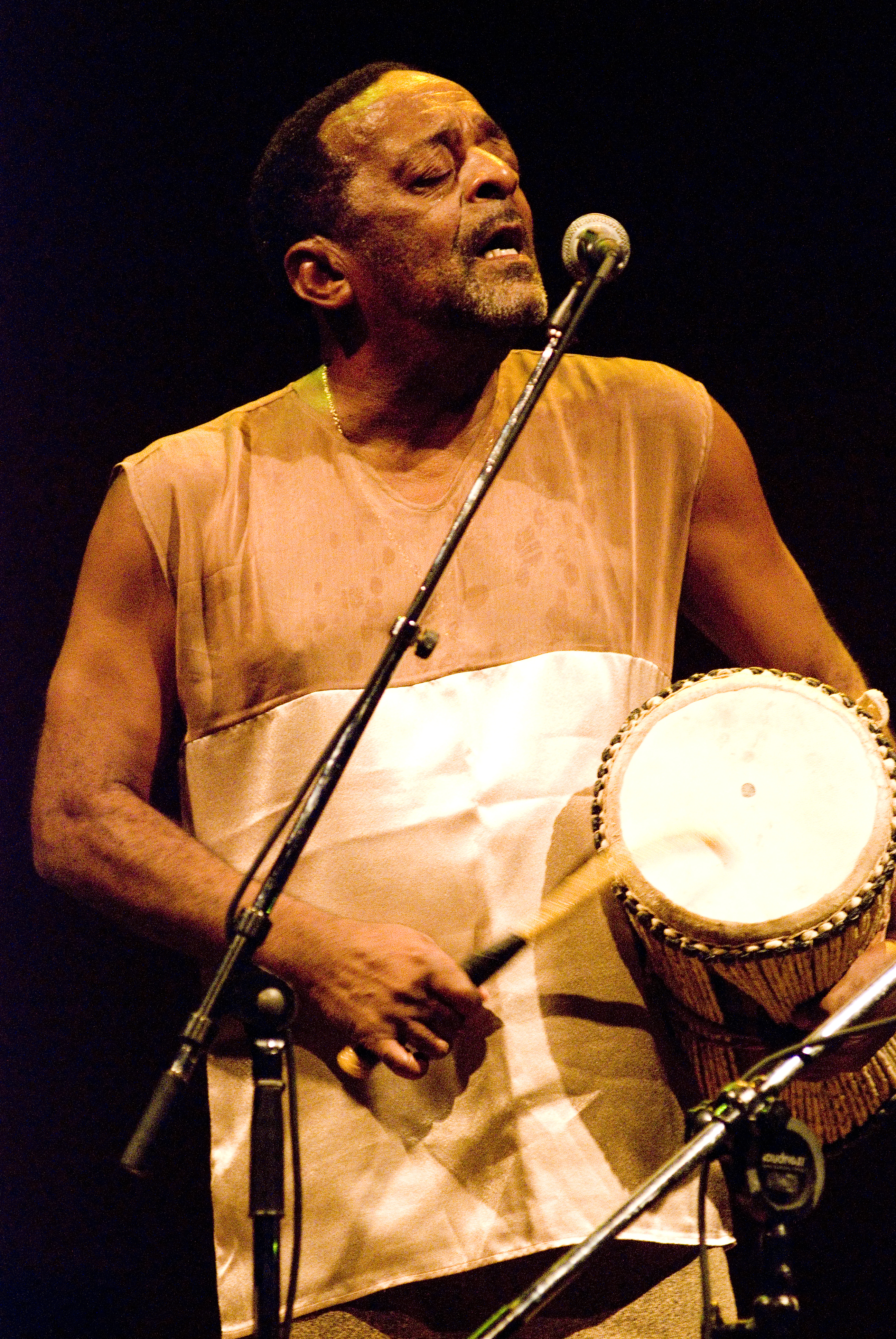 No Teatro Municipal. Foto: Silvio Tanaka.